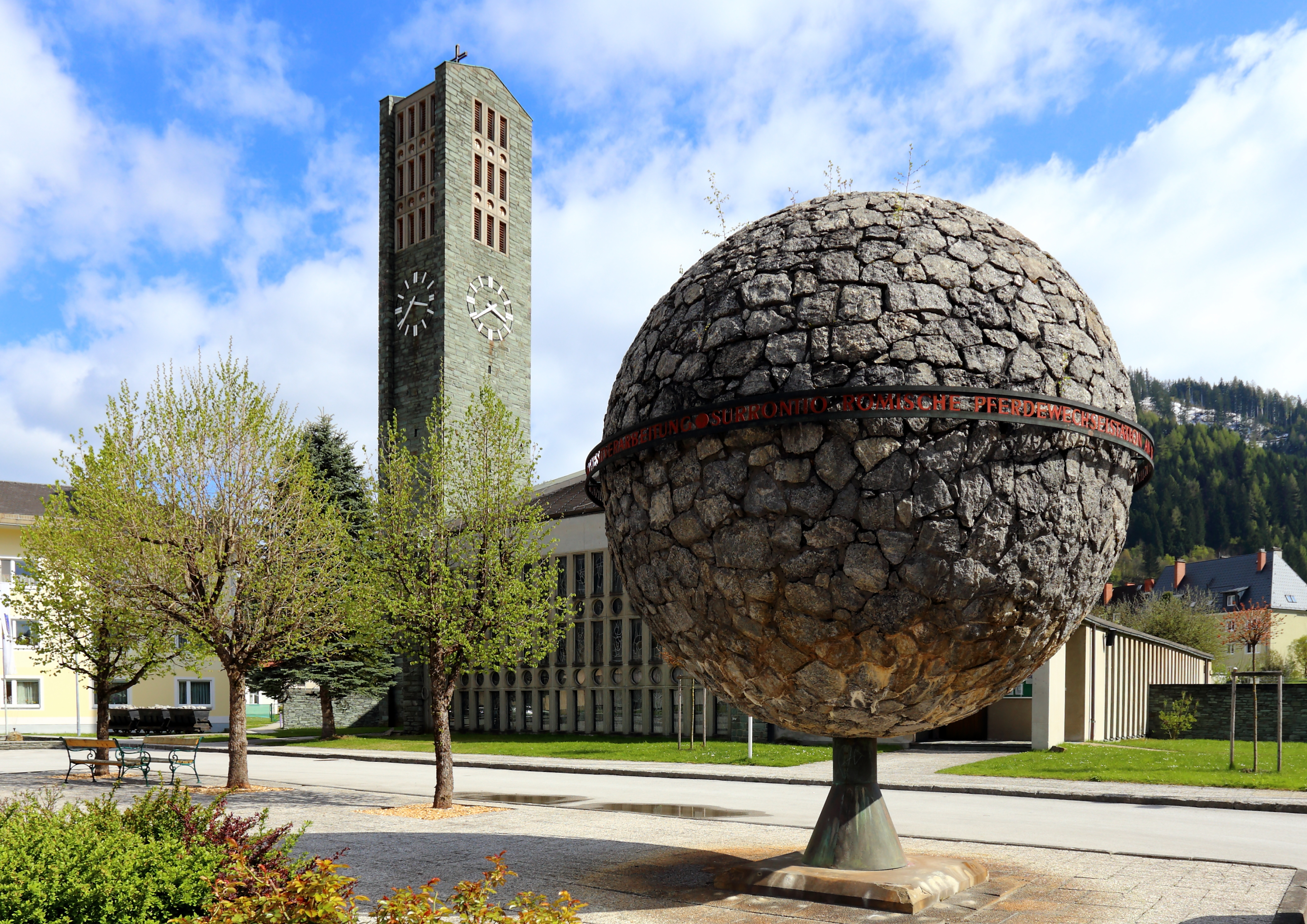 Die Weltkugel, ein Denkmal der Magnesit-Werke in der steiermärkischen Stadt Trieben. Die Magnesitkugel wurde von dem österreichischen Bildhauer Rudolf Hoflehner für die Weltausstellung 1958 in Brüssel entworfen. 1966 wurde sie im Zuge der Markterhebungsfeierlichkeiten auf dem Hauptplatz in Trieben aufgestellt. Die Weltkugel symbolisiert die weltweite Verwendung von Magnesitprodukten aus Trieben. Das Metallband um die Weltkugel hat folgende Inschrift: „Surrontio römische Pferdewechselstation an der Salzstraße über die niederen Tauern, seit dem 8. Jahrhundert Trieben genannt. Heute ein Zentrum der Magnesitverarbeitung“.Dahinter die in den Jahren 1961 bis 1963 errichtete Pfarrkirche hl. Andreas.